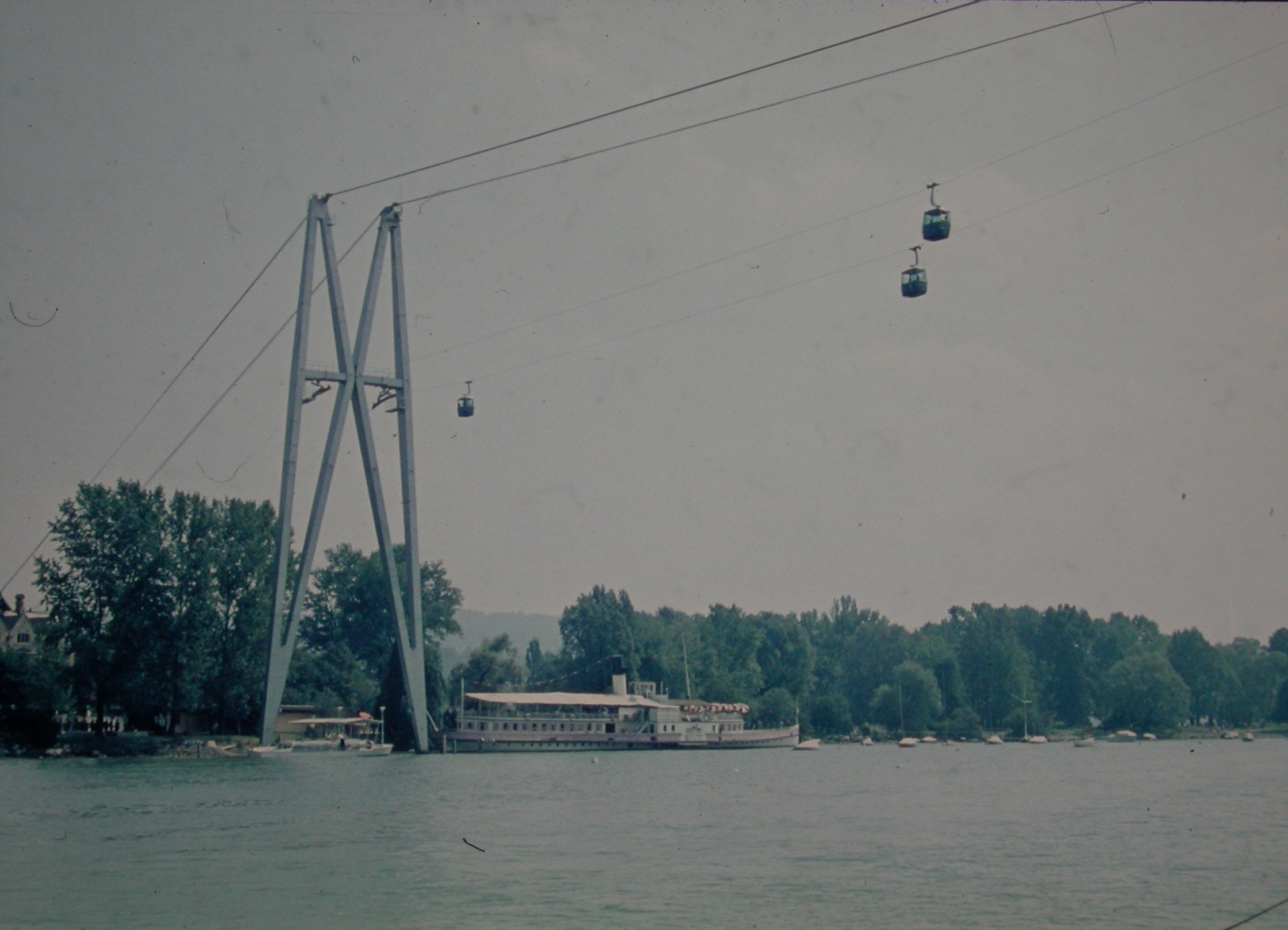 Schweizerische Gartenbau-Ausstellung